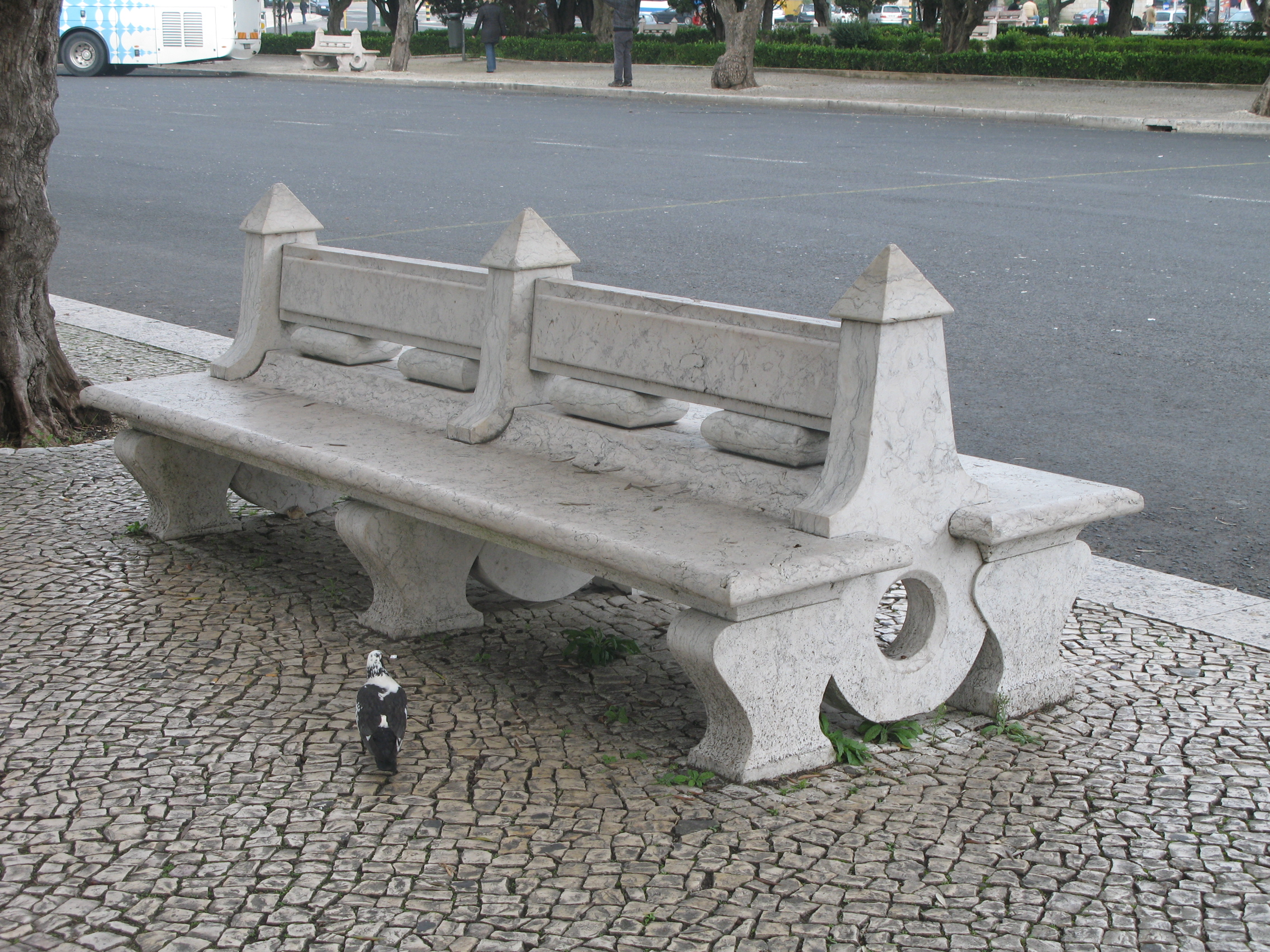 Klop v parku v Lizboni (Portugalska)